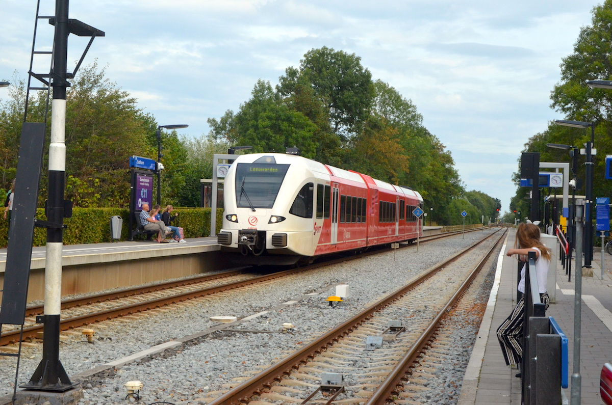 Een Arriva Spurt passeert het Station Zuidhorn op weg naar Leeuwarden. Foto: Erik Swierstra.